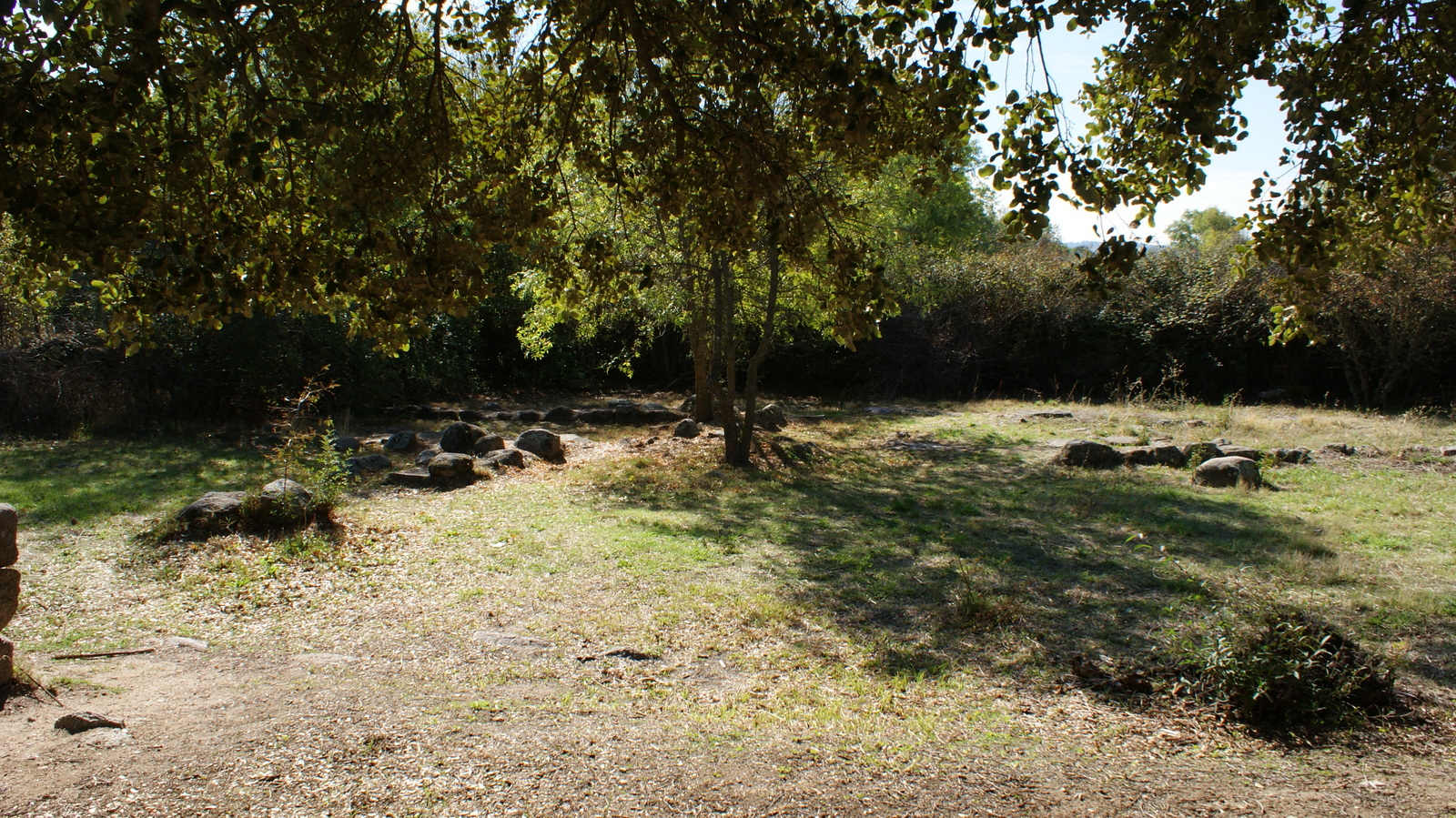 Toros de Guisando, conjunto escultórico vetón (siglo II a. de C.) y entorno donde se firmó el Tratado de Guisando entre el rey de Castilla Enrique IV y su hermanastra Isabel, futura reina de Castilla, ubicados en las inmediaciones del cerro de Guisando, del que toman nombre. Término municipal de El Tiemblo, Ávila. Comunidad Autónoma de Castilla y León.